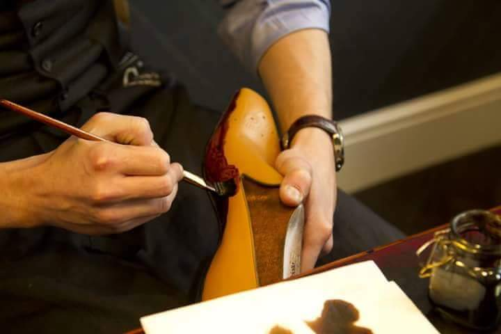 Un artisan patineur appliquant une patine de couleur rouge au pinceau, sur une chaussure en cuir.